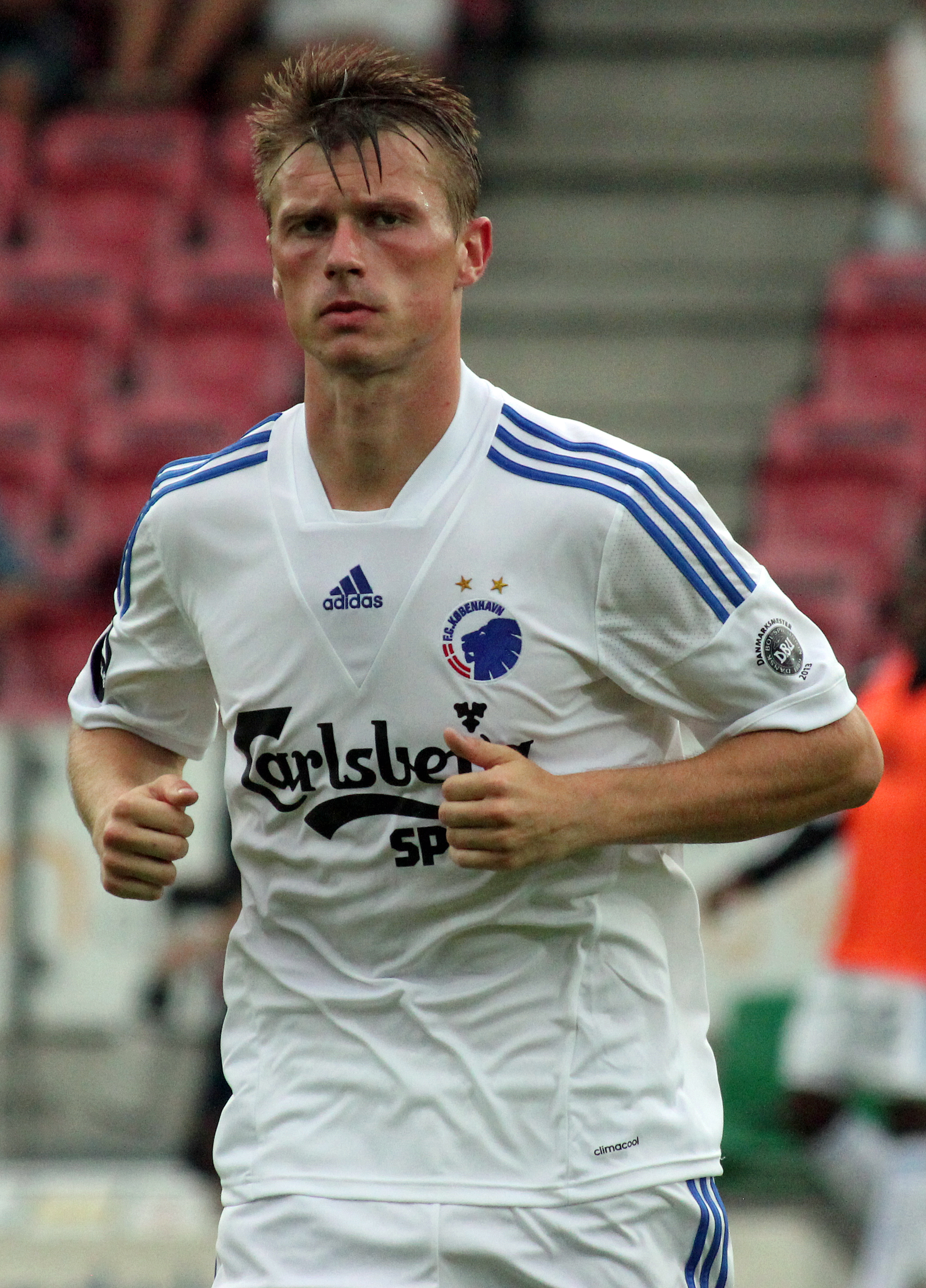 Marvin Pourié inden 2. halvleg af FCM-FCK 28. juli 2013